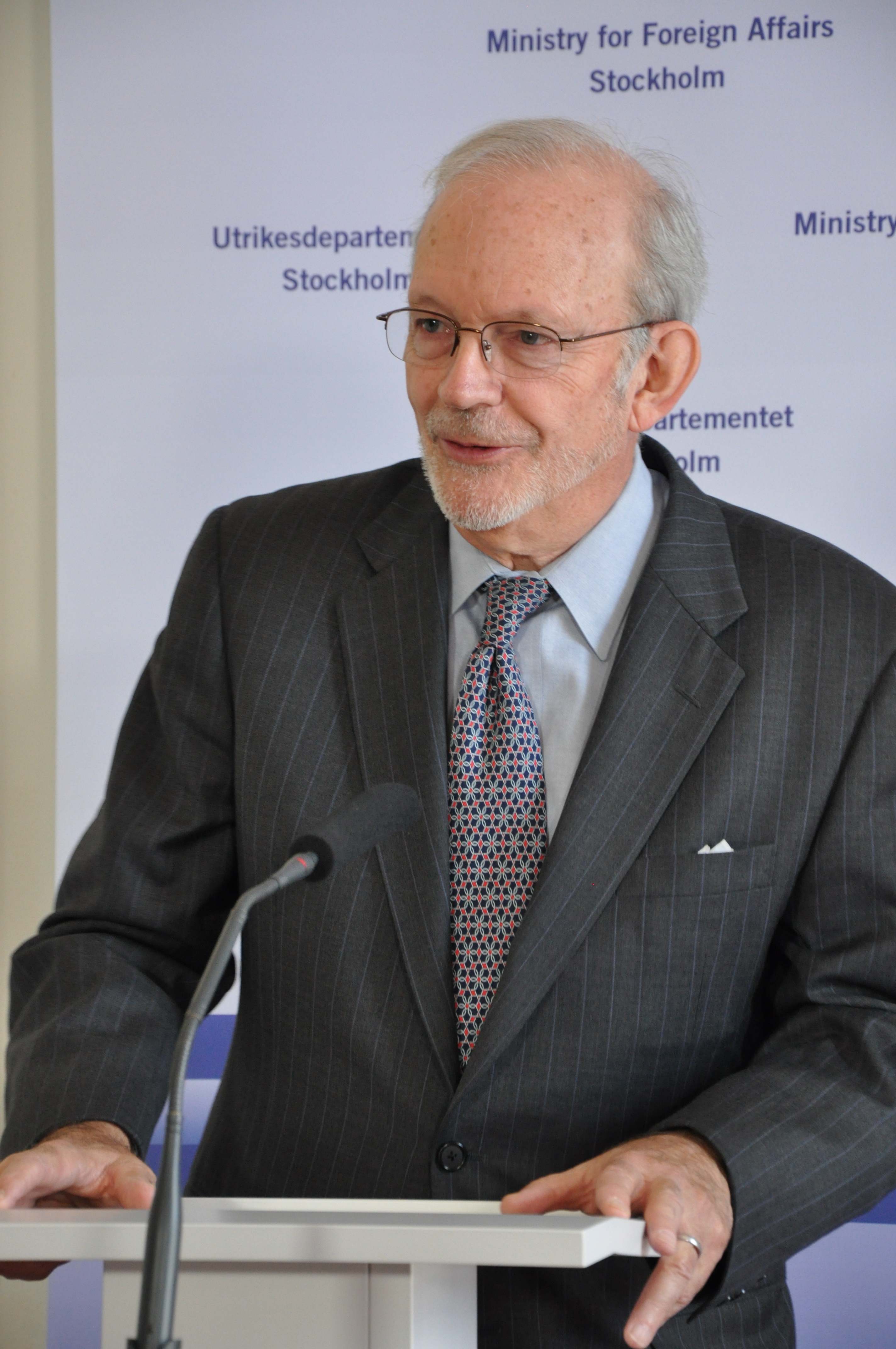 アンソニー・レイク.